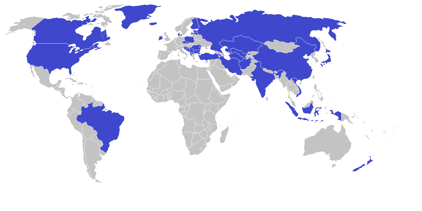 Страни, които участват на IDO 2014